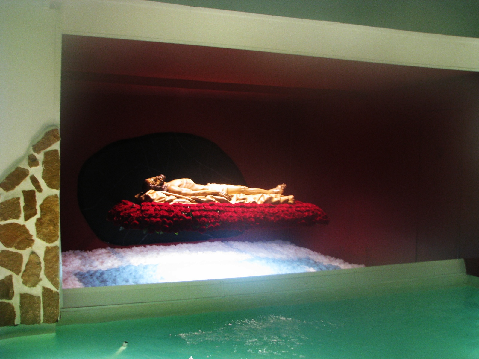 Dosel de la hermandad de la Santa Cena. Primer Premio Dosel 2011.